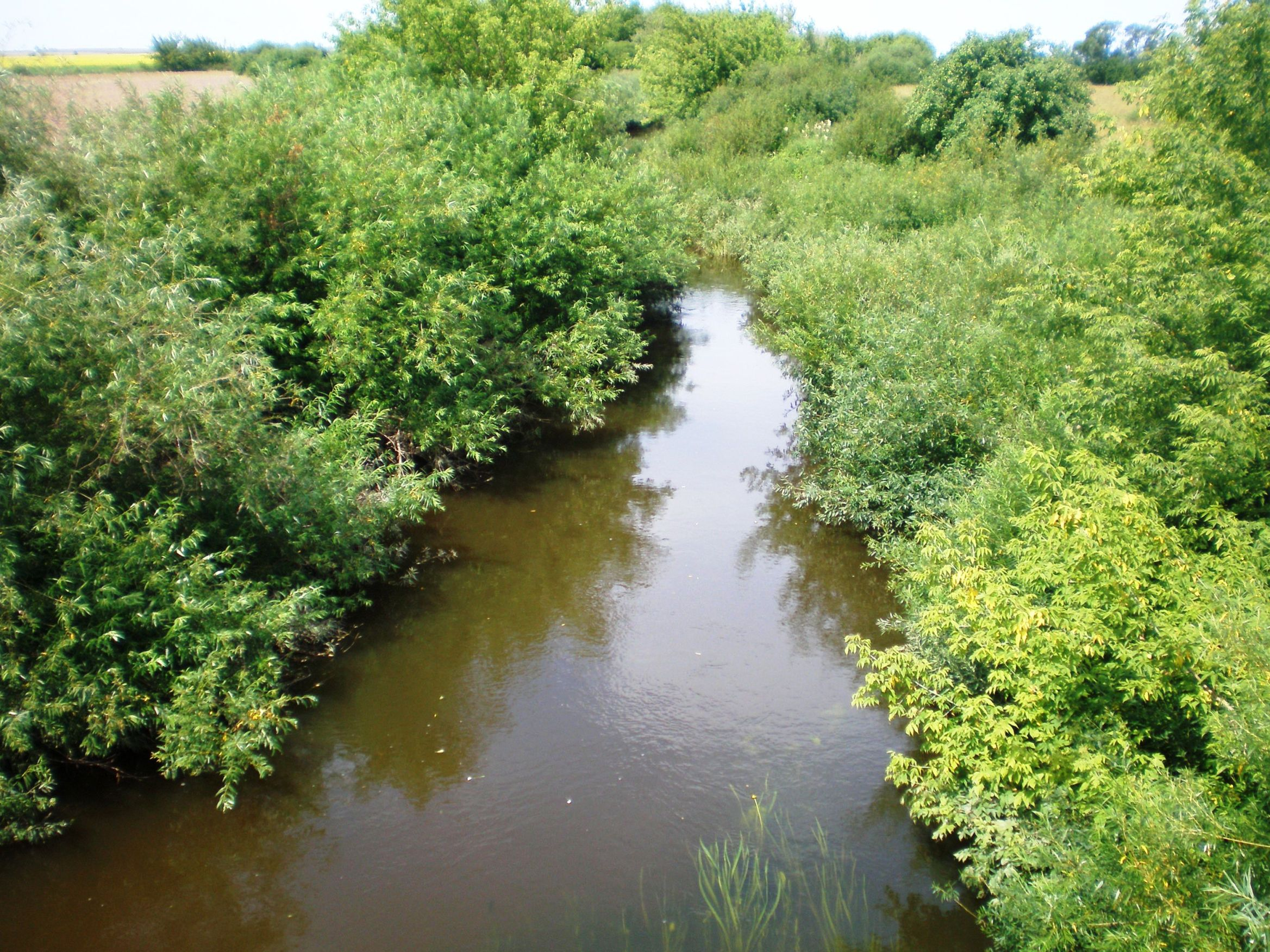 Širvinta (pagal ženklą), Šeimena (pagal žemėlapį) netoli Keturkaimio, Vilkaviškio raj.